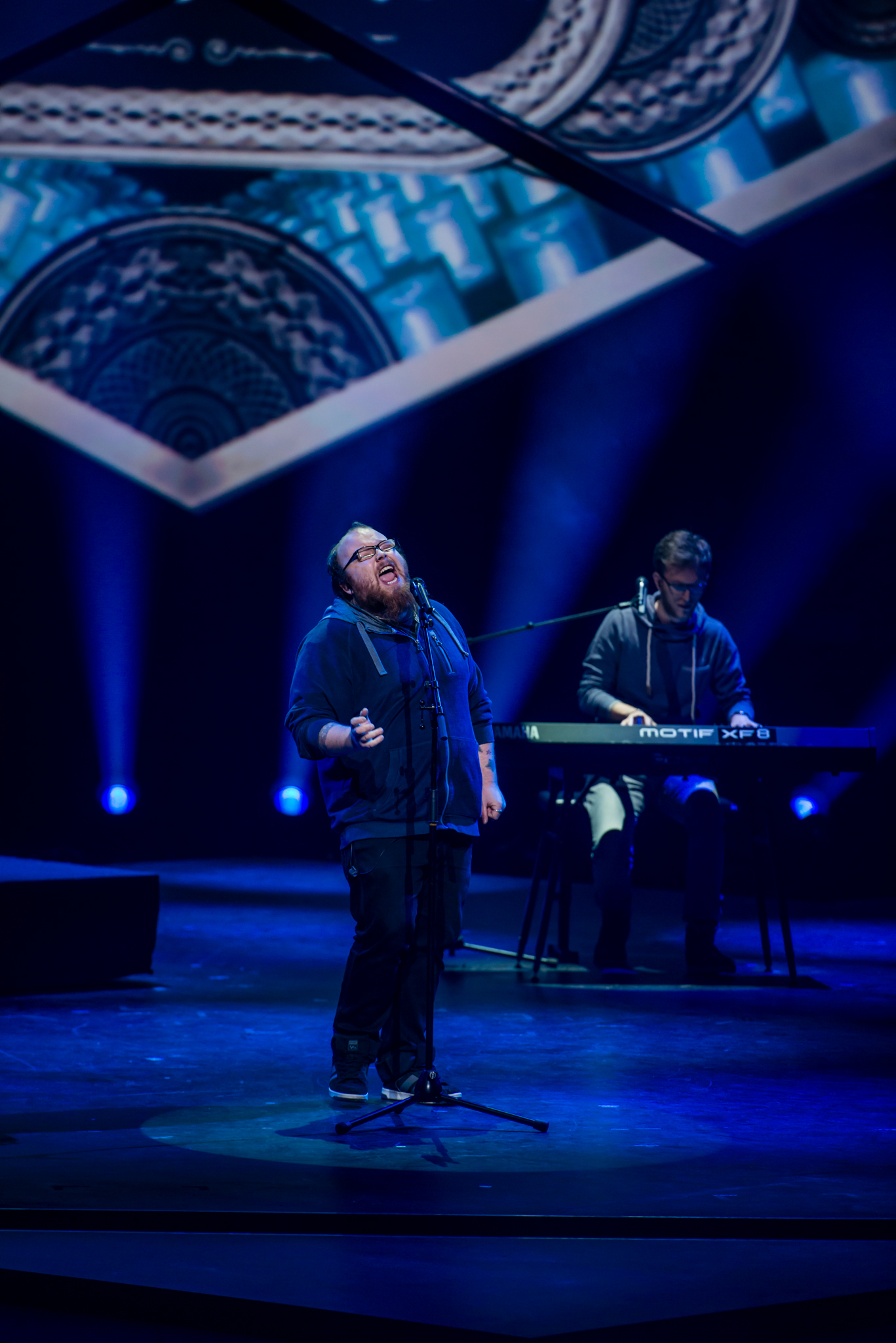 'Eurovision Song Contest 2015 - Unser Song für Österreich Live Show': 'Andreas Kümmert'